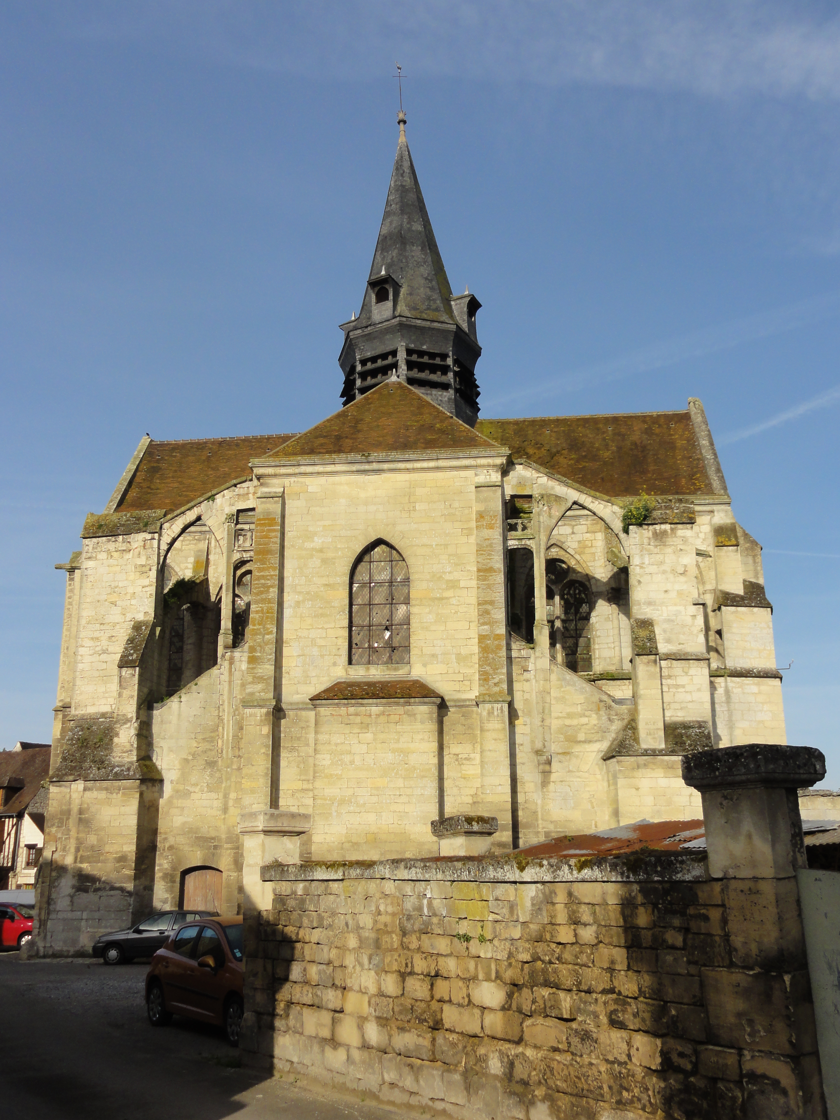 Façade orientale.